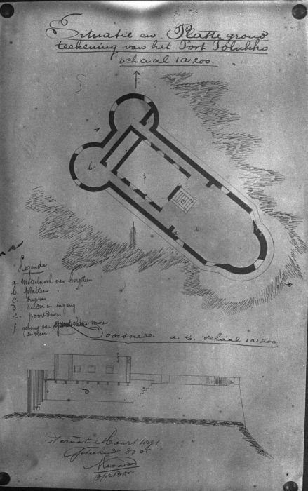 Foto. Opname van een situatieschets en plattegrond van het Fort Tolukko, Wichmann expeditie Molukken 1903